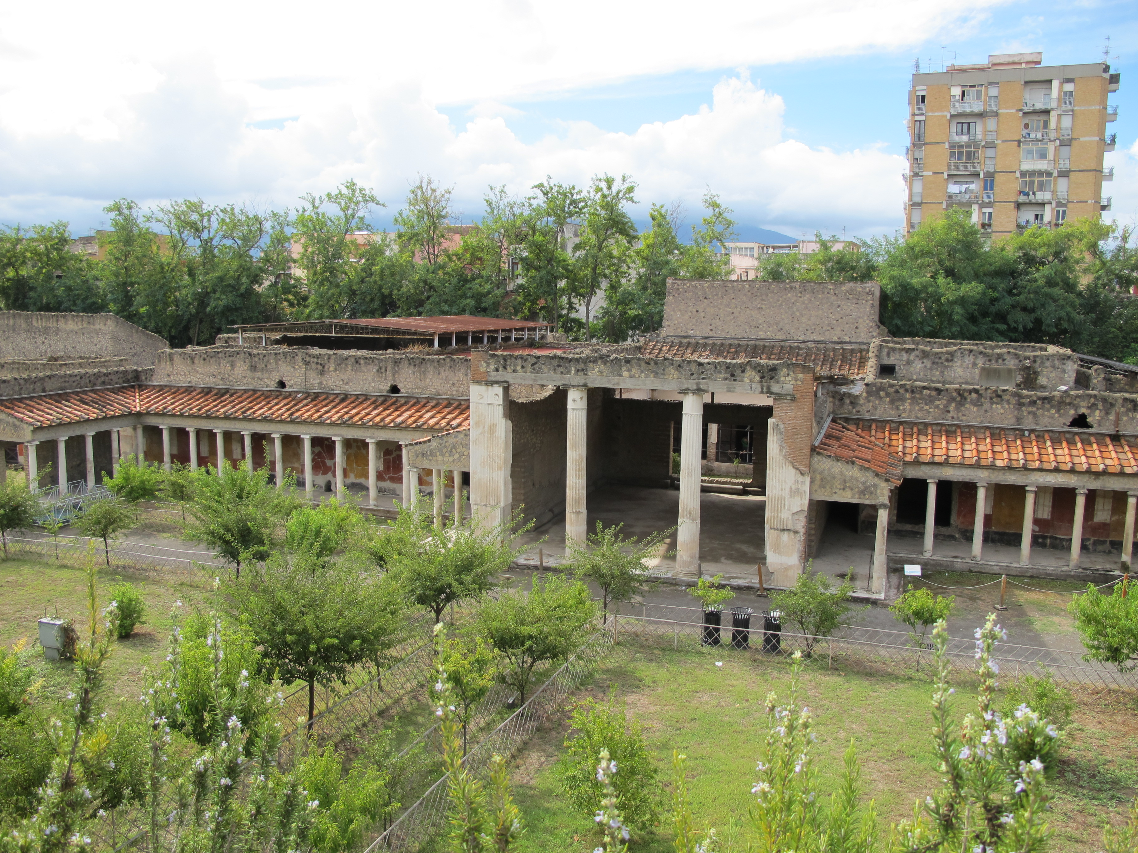 Villa Oplontis